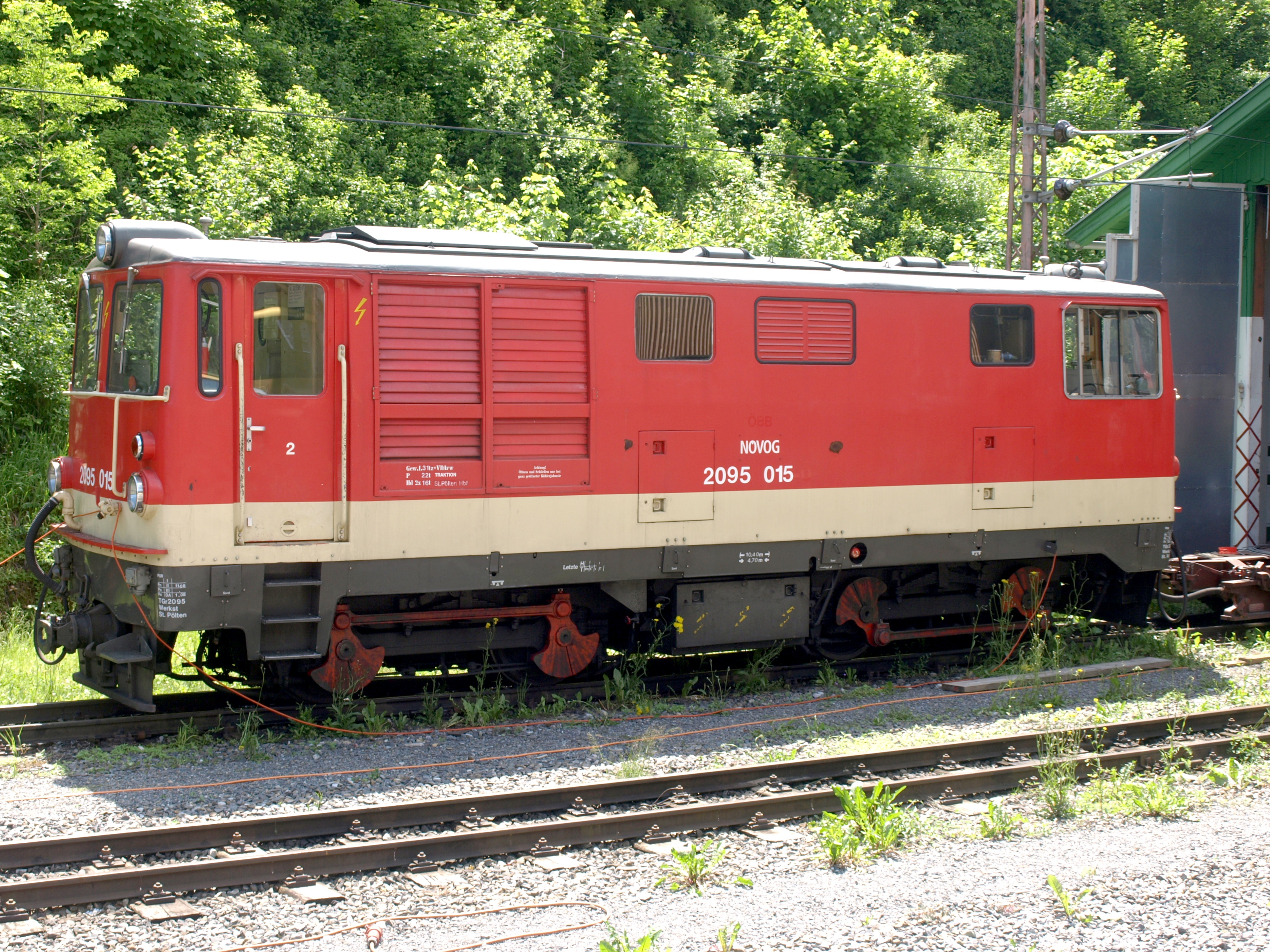 NÖVOG Dieseltriebfahrzeug Reihe 2095.015 vor dem Lokschuppen Bahnhof Laubenbachmühle